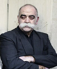 عطا‌الله امیدوار در مراسم ترحیم محمدرضا لطفی ۲۱ اردیبهشت ۱۳۹۳